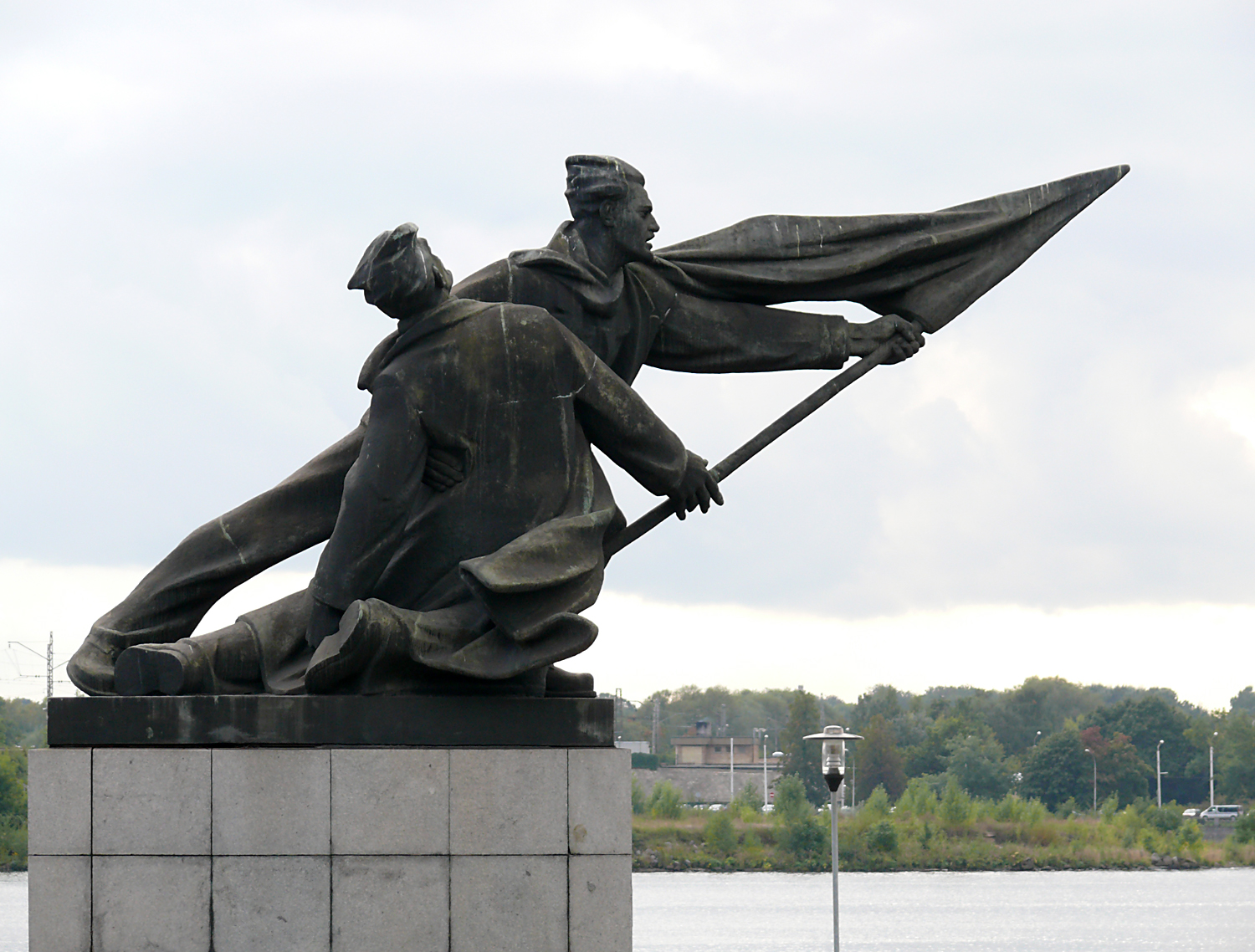 Piemineklis 1905. gada revolūcijas dalībniekiem, Rīgā, 11. Novembra krastmalā pie Dzelzceļa tilta - vietā, kur 1905. gada 13. janvārī tika apšauta strādnieku un studentu demonstrācija. Autori: arh. Kārlis Plūksne un tēln. Alberts Terpilovskis. Apraksts: uz granīta postamenta novietotas divas reālistiskas bronzas skulptūras dinamiskā kustībā - tajā attēlots cīņas karoga pārņemšanas brīdis, vienam no demonstrantiem saļimstot. Piemineklis atklāts 1960. gadā.